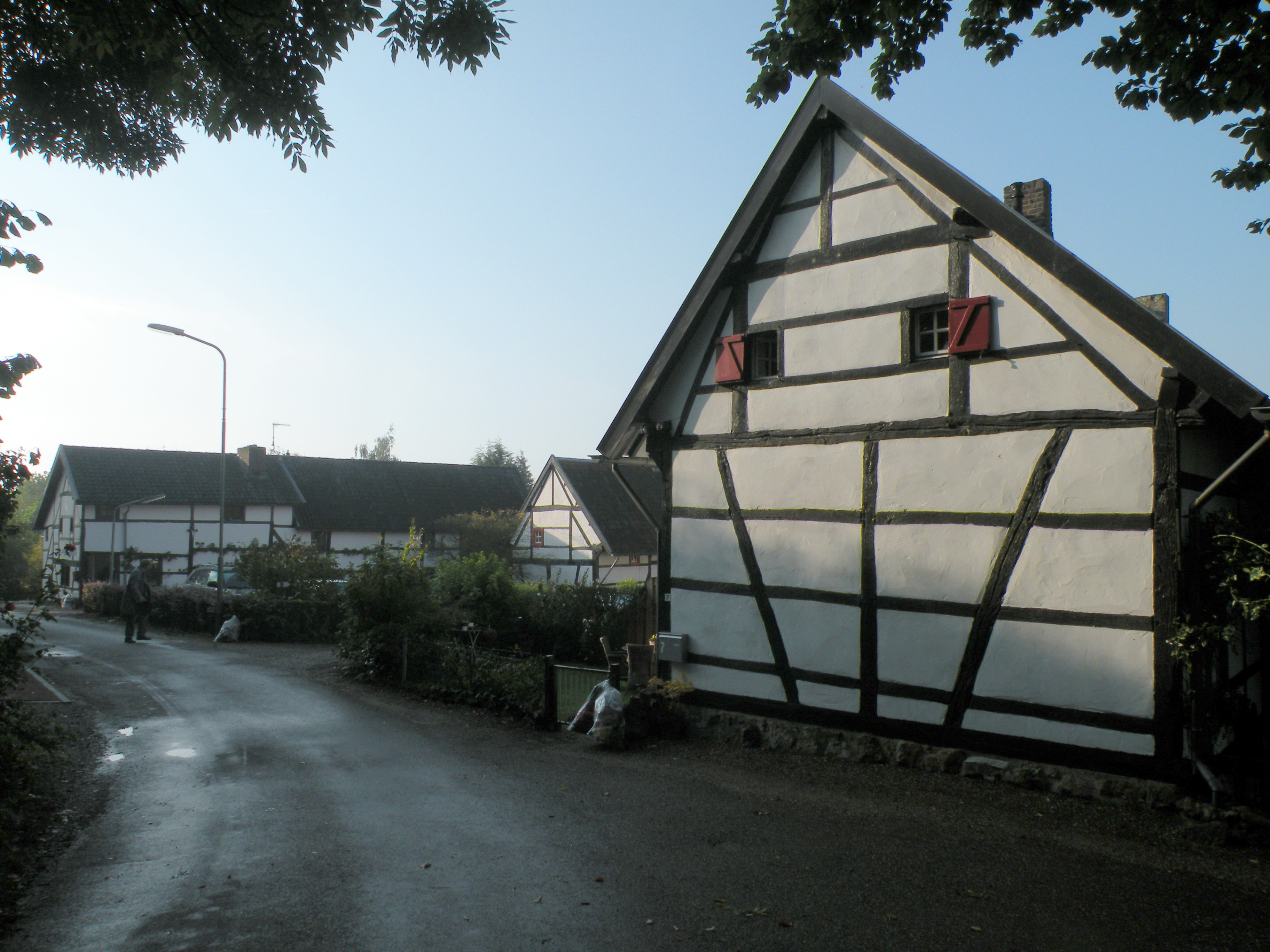 Camerig 6-10